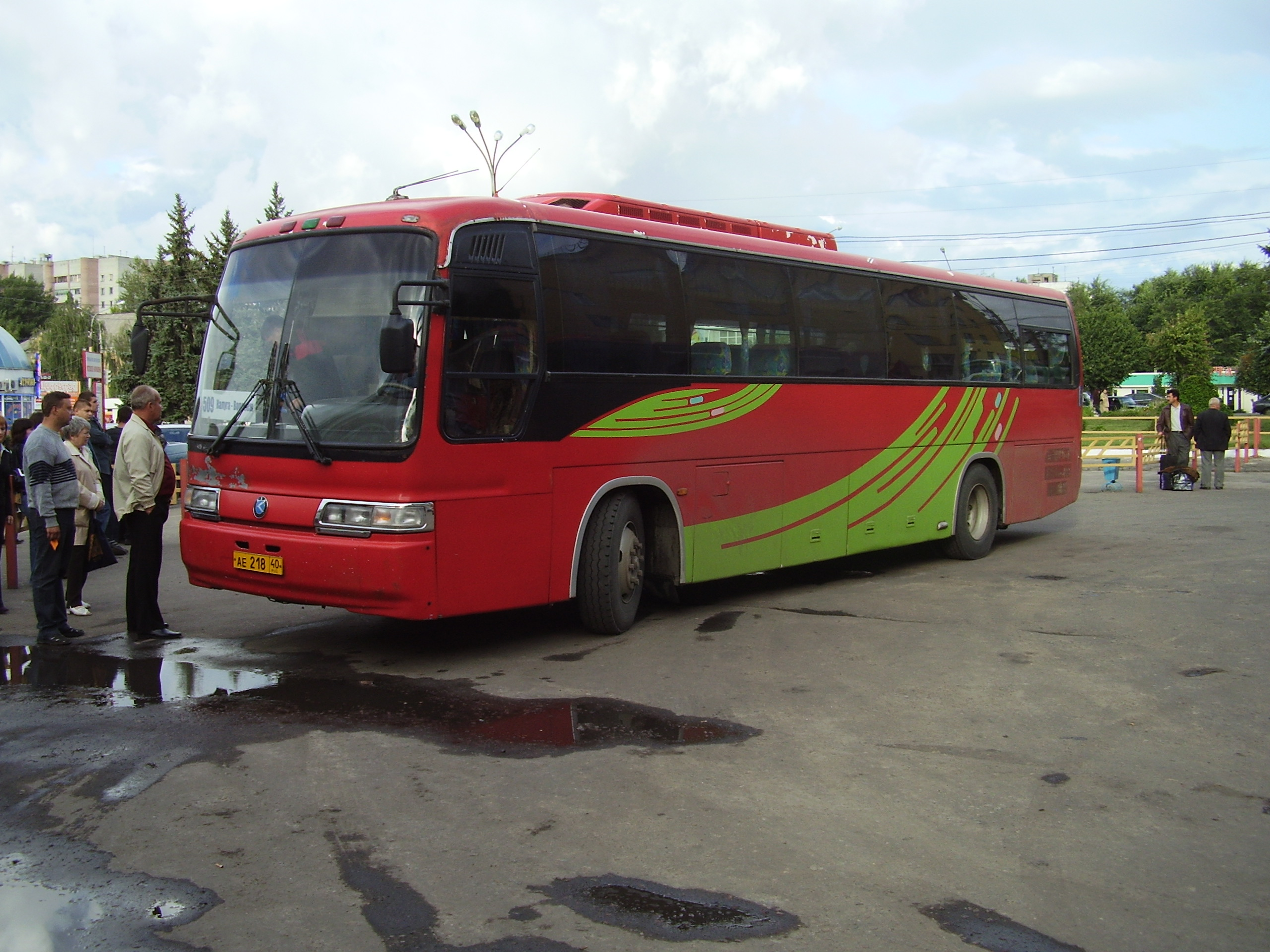 Междугородный автобус KIA Granbird